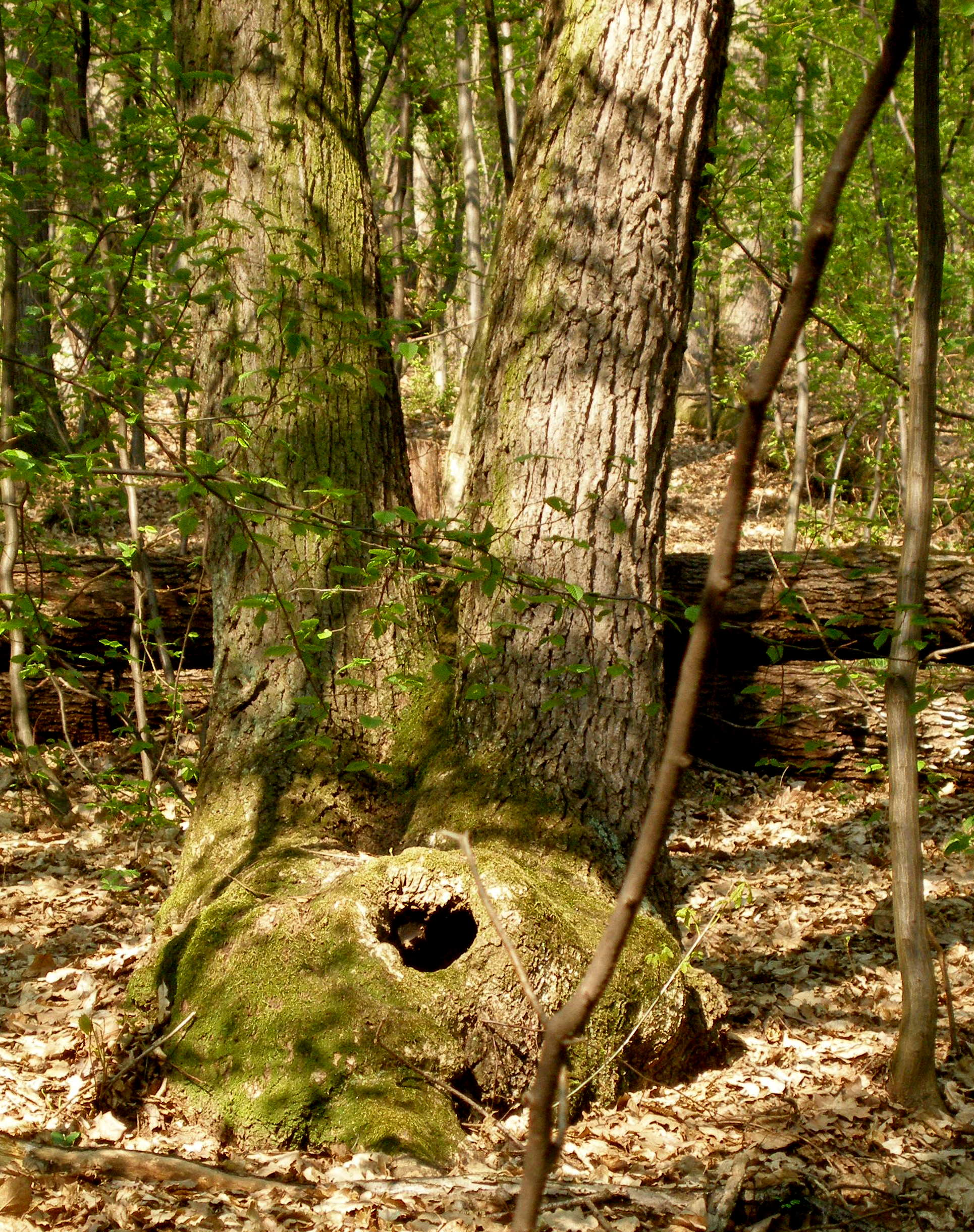 Cesta na Šarišský hrad nad mestečkom Veľký Šariš. Slovensko